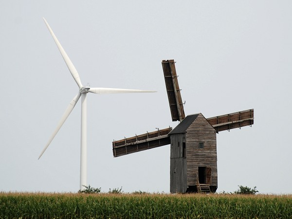 Moulin Fernand Barbier à Levesville-la-Chenard